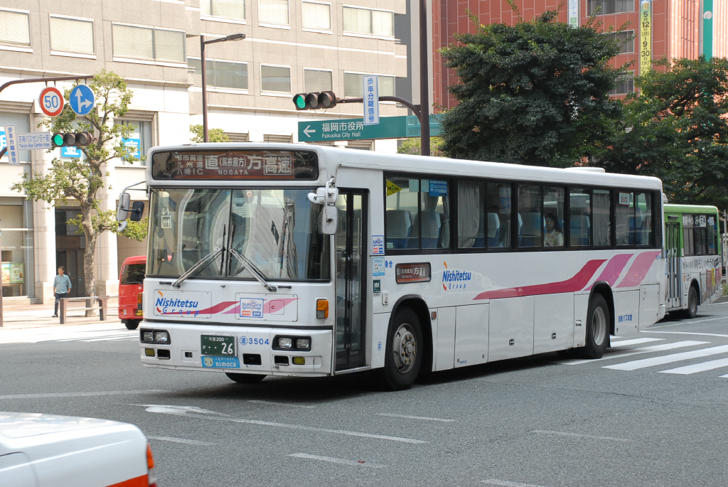 筑鉄直方行き 2014-9-27撮影